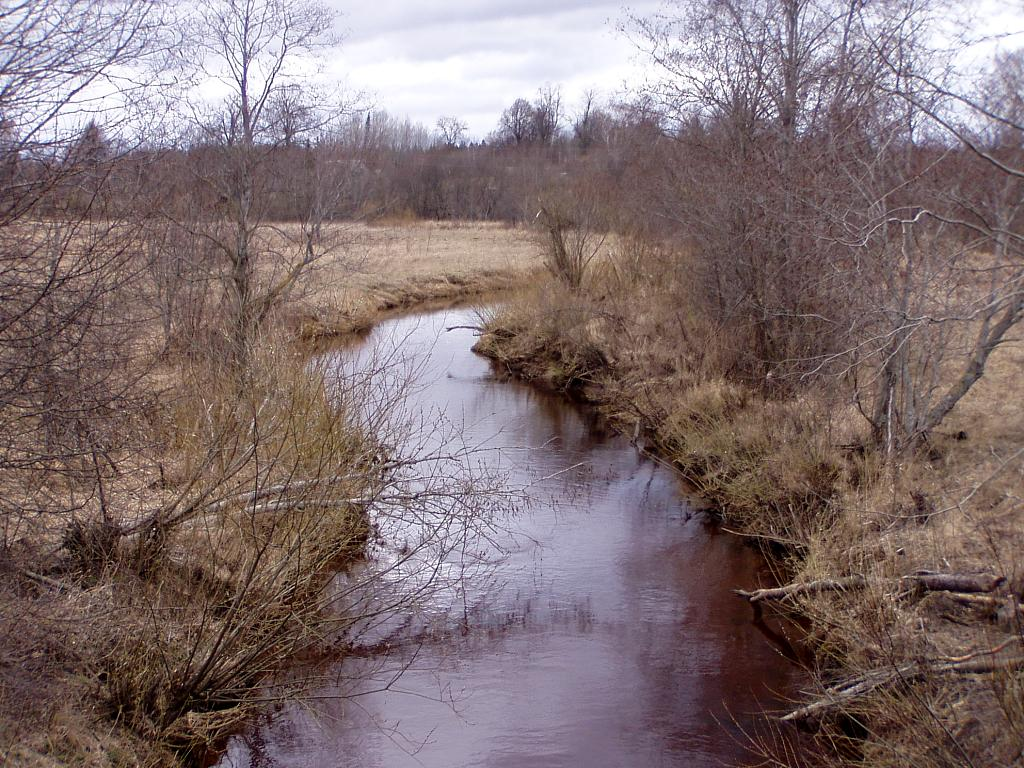 Palsa pie Ūdrupes 2007-04-06